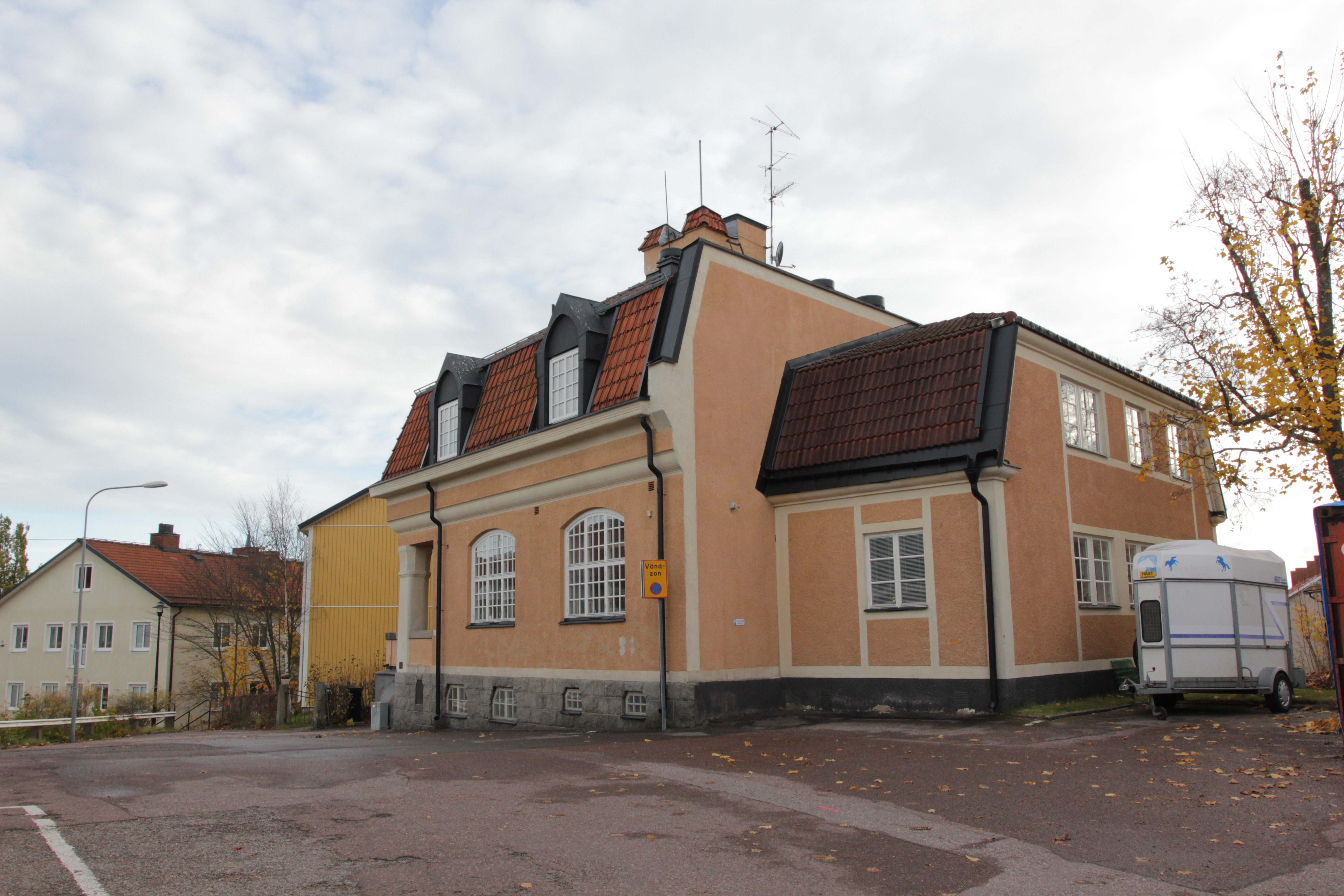 Gamla sparbanken, Hedemora, Sverige